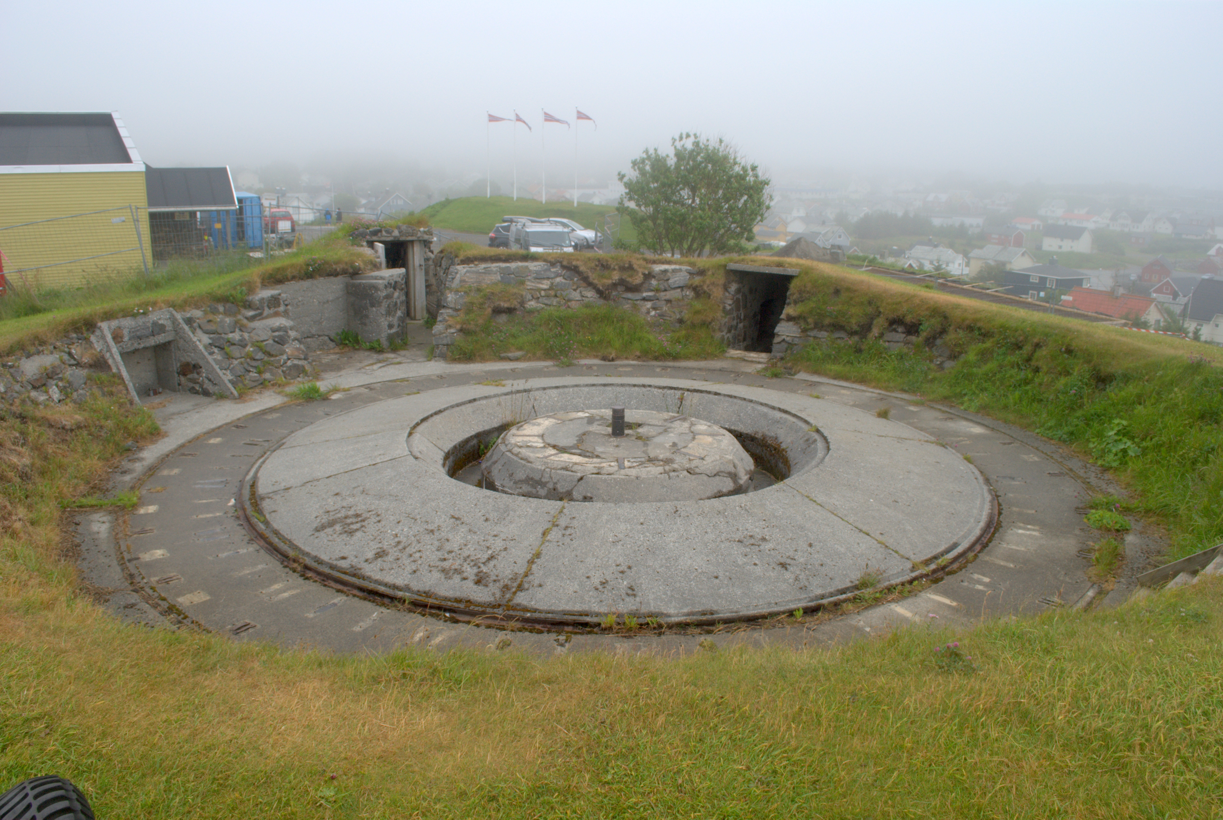 Detaljer fra Ergan kystfort ved Bud i Møre og Romsdal - Stilling for 15, 5 cm fransk feltkanon K416 (f)